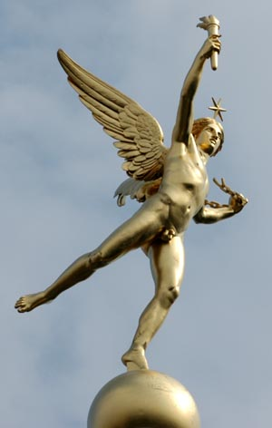 Genie de la Liberté on the July Column, Paris, France.